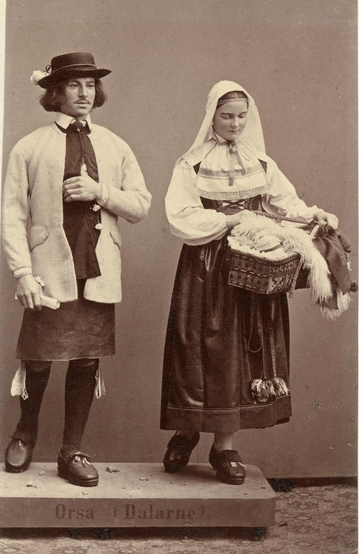 Par ifrån Orsa Dalarna Dockor klädda i folkdräkt. Från Johan Adolf Andersohns samling. Till Vänersborgs museum 1886. Johan Adolf Andersohn (1820-1887) var handlare/filantrop och museets grundare (Vänersborgs museum). VMAA391.